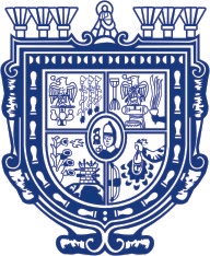 Escudo del Municipio de Tehuacán, Puebla, México.